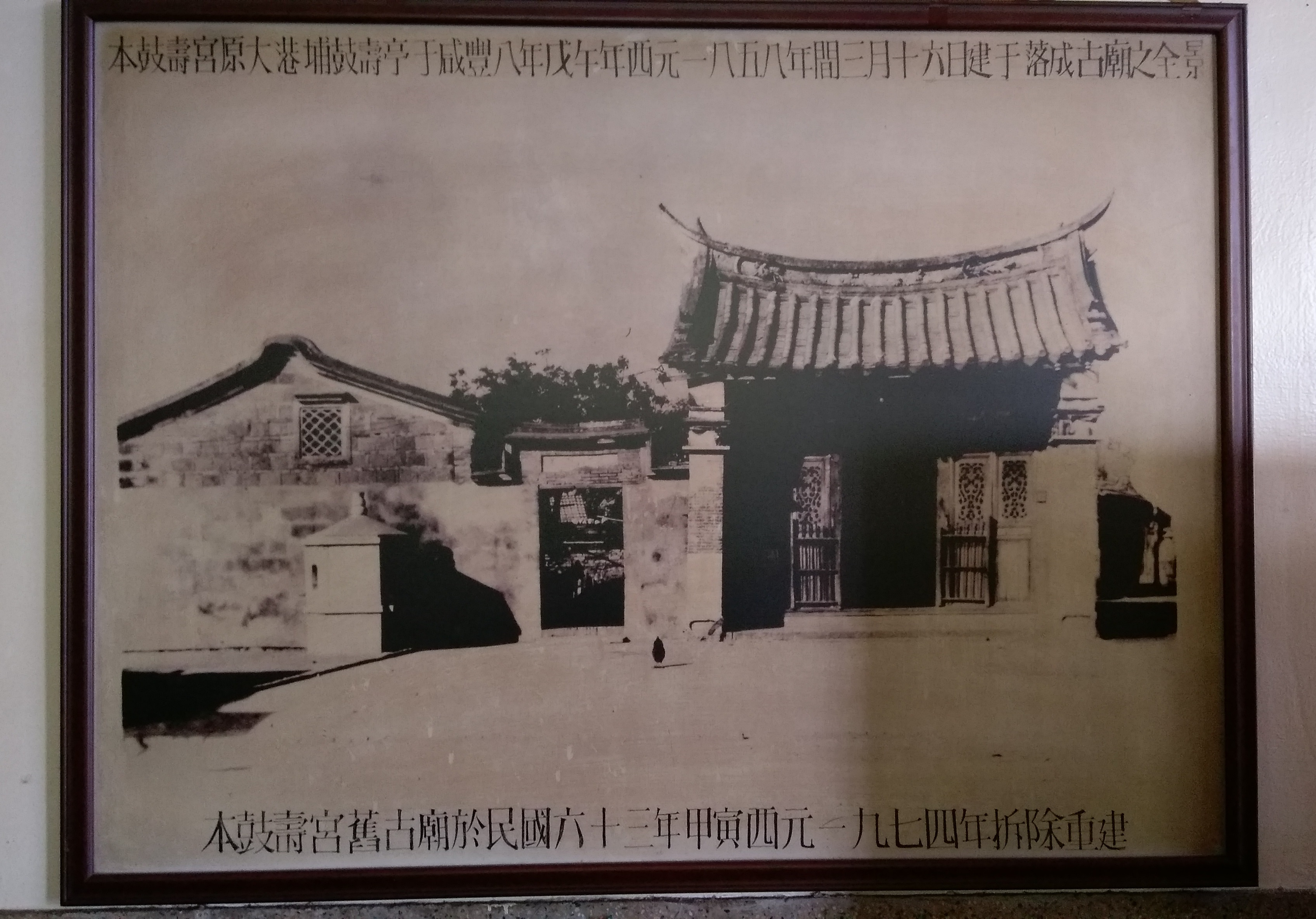 中文（台灣）: 拆除重建前的大港埔鼓壽宮舊廟